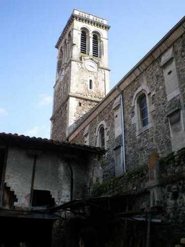 Sarras détail